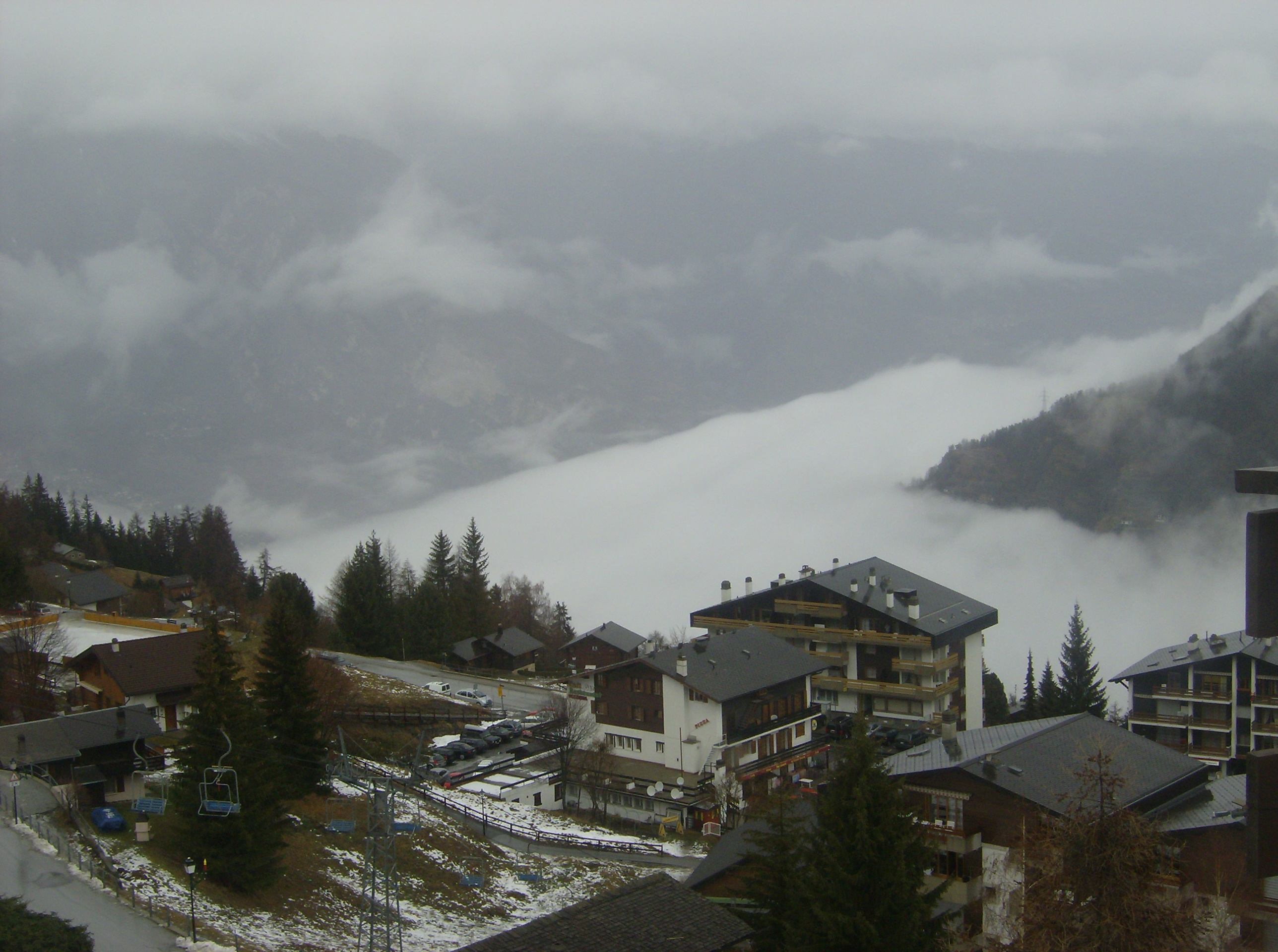 Mist in de Rhônevallei (Riddes, Zwitserland).